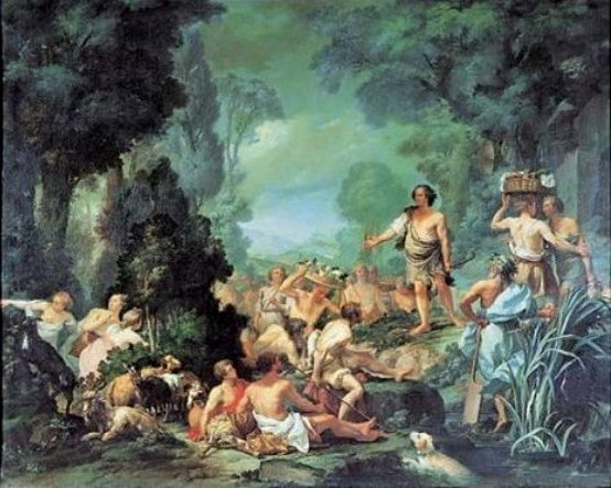 Frugoni in Arcadia, olio su tela di Pietro Melchiorre Ferrari.